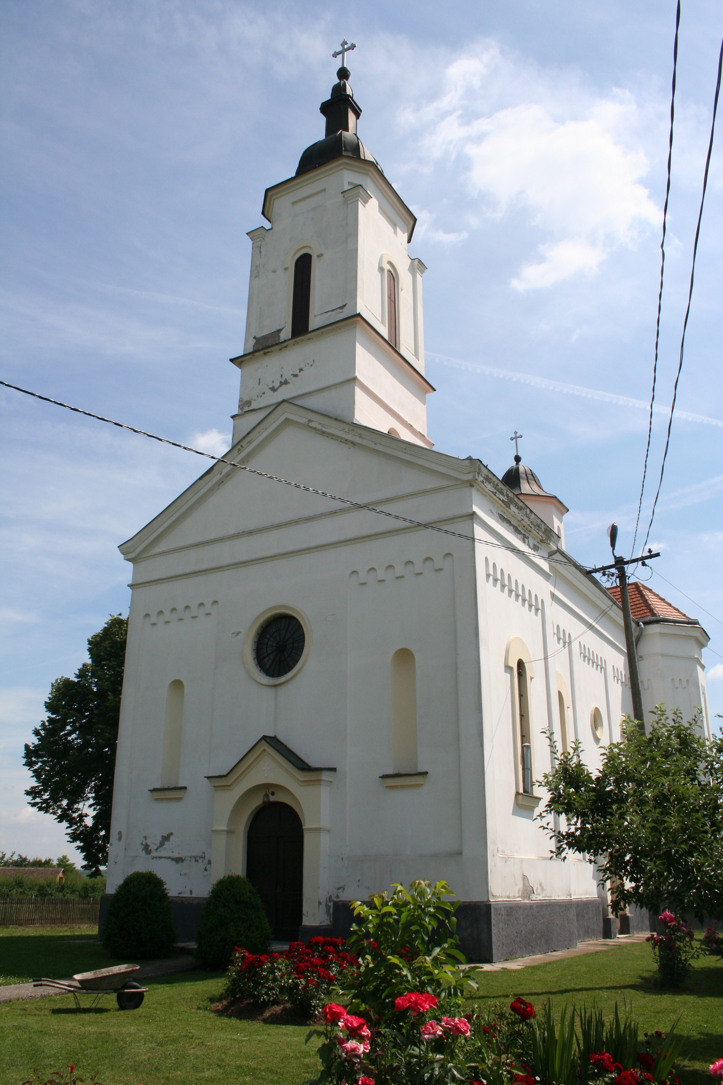 Crkva Svetog Ilije, Mehovine, opština Vladimirci